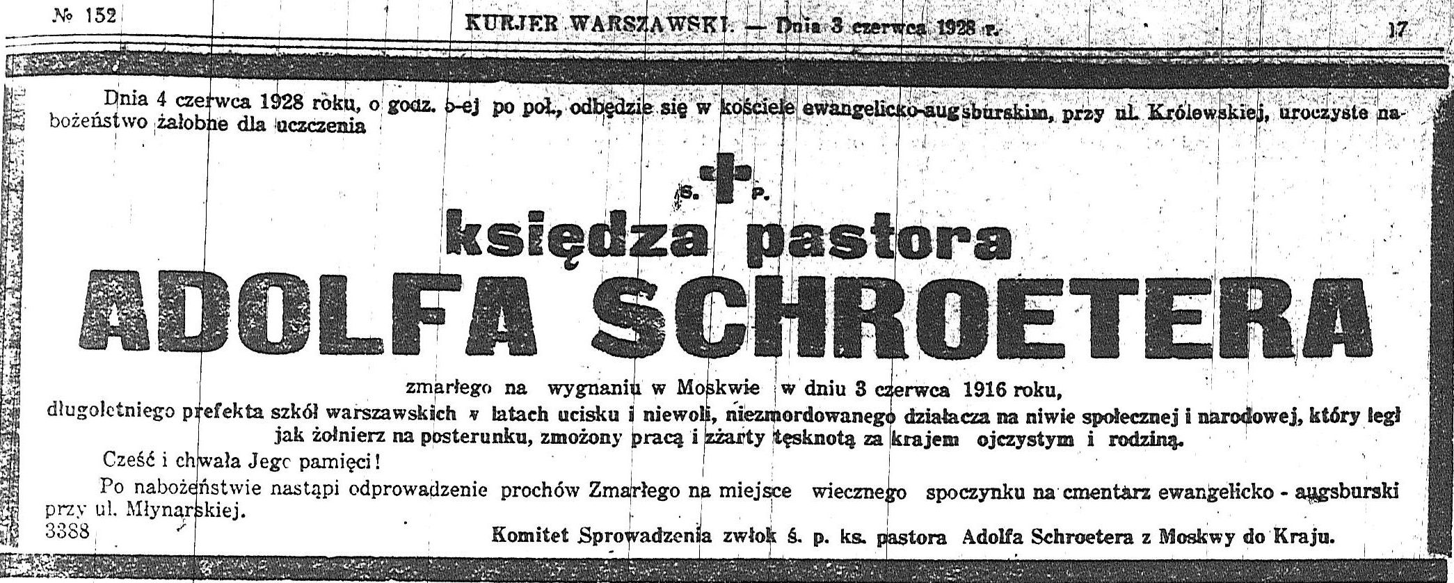 domena publiczna